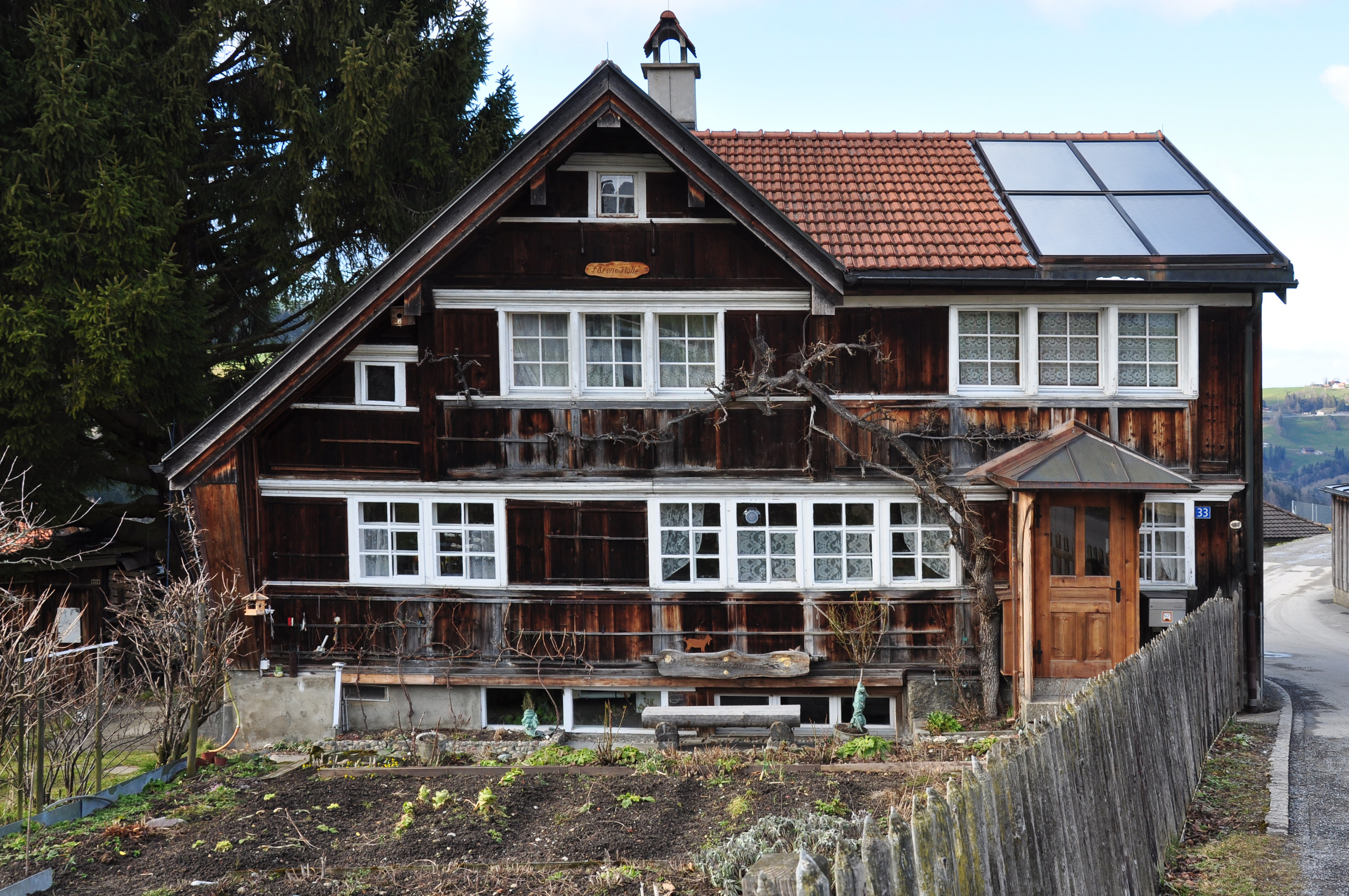 Die Förene Hütte an den Niederen 33 in Trogen